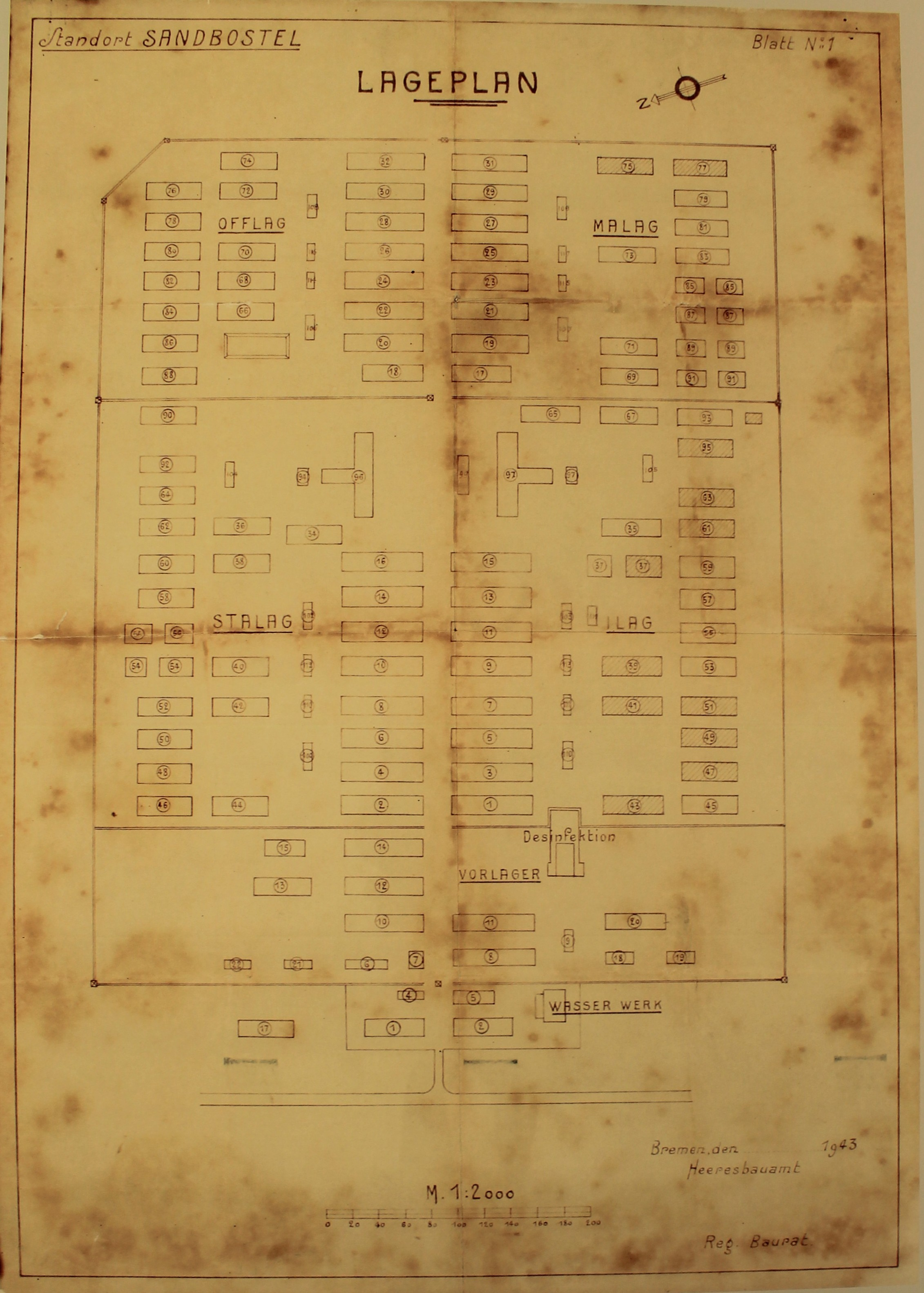 Plan des Stammlagers X B in der Gedenkstätte Lager Sandbostel.